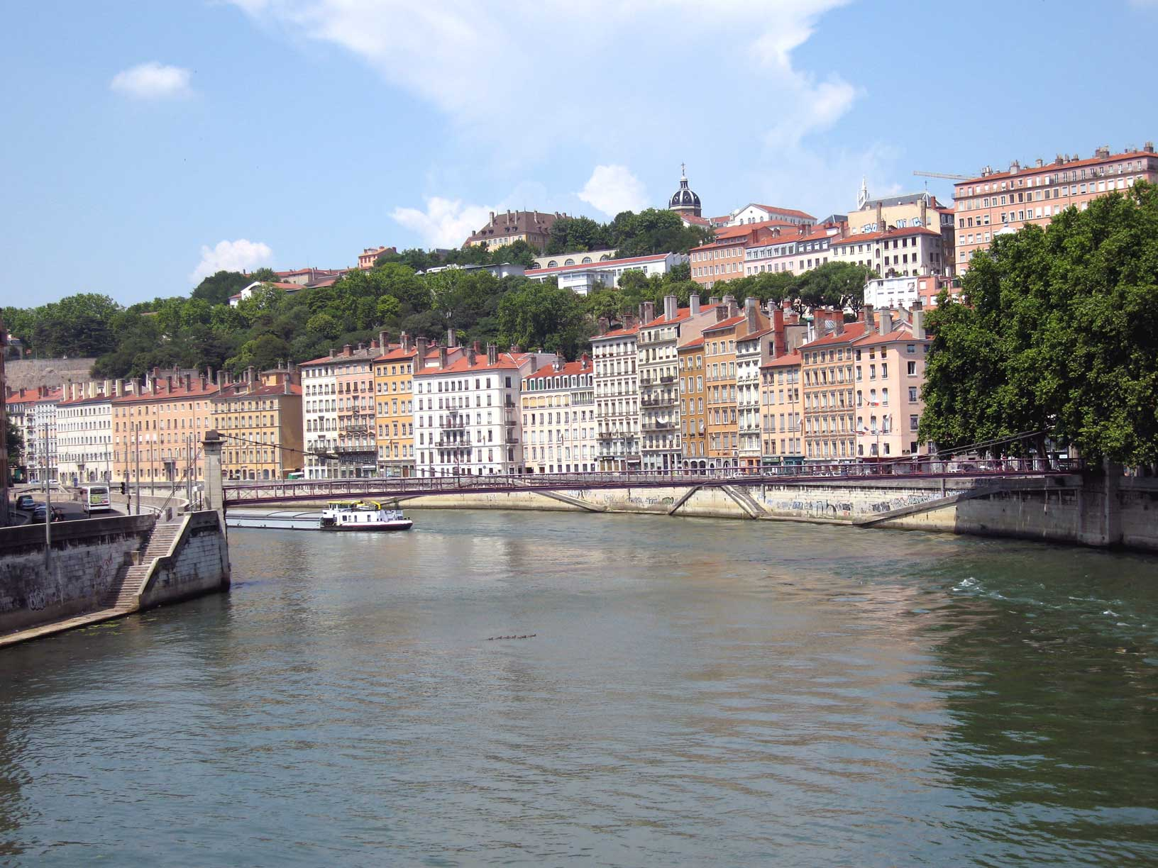 Colline de la Croix Rousse et Saone à Lyon